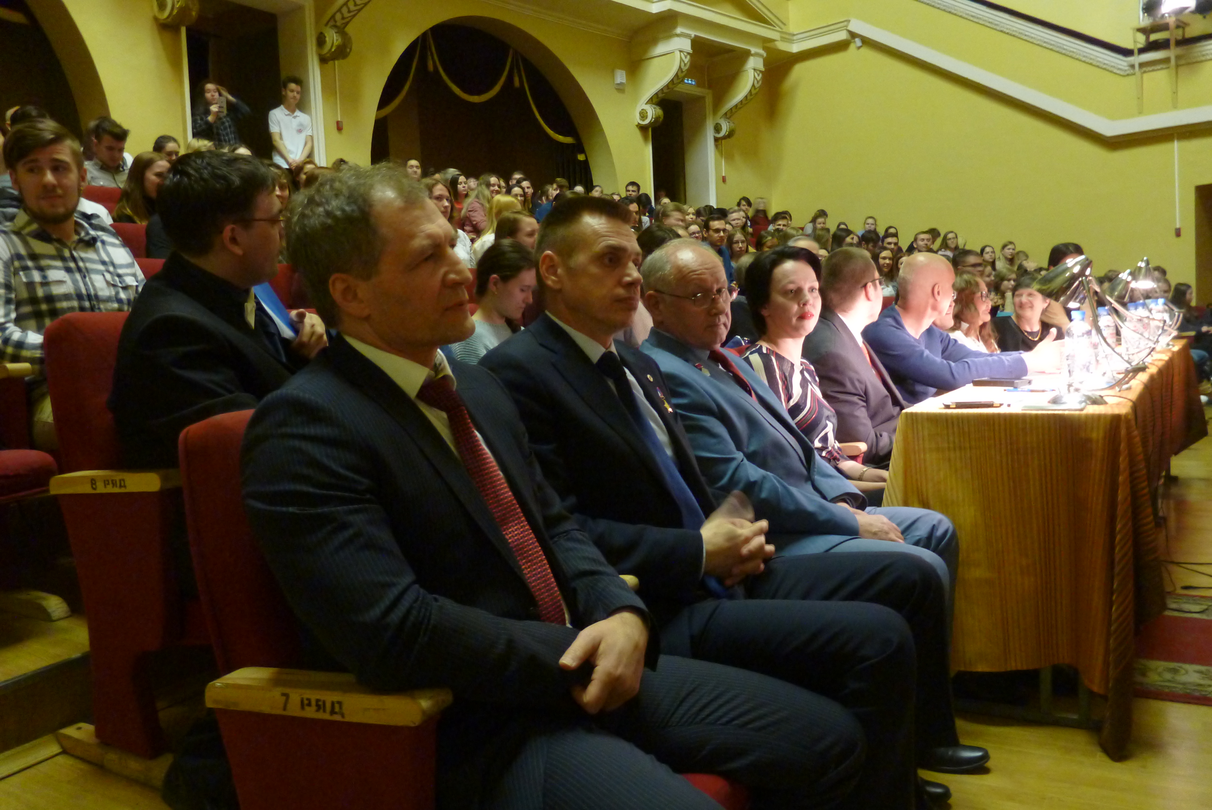 Председатель Екатеринбургской городской думы (ЕГД) Игорь Валерьевич Володин, депутат ЕГД, герой России Сергей Воронин и летчик-космонавт Анатолий Арцебарский в Окружном доме офицеров. Екатеринбург, 18 апреля 2019 года